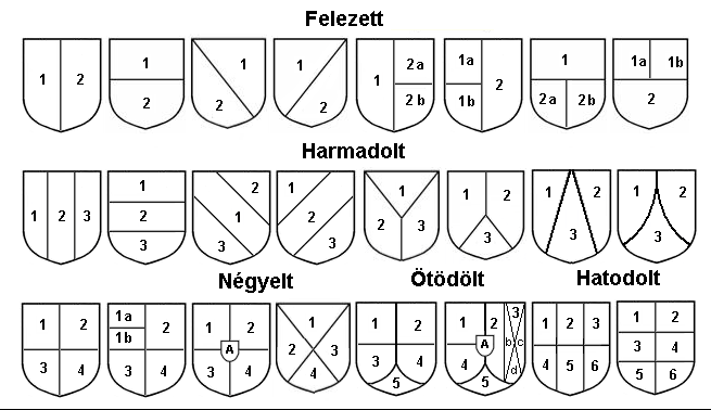 Címertípusok